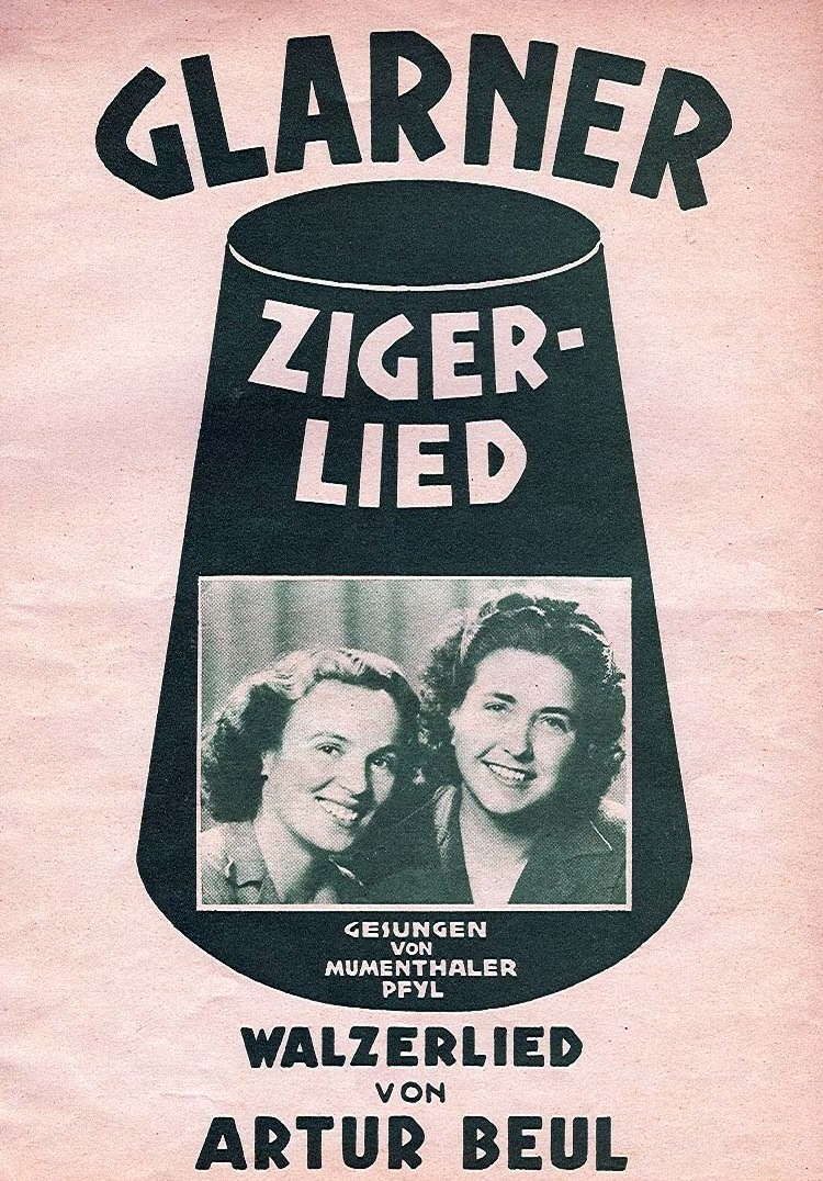 Notenblatt Zigerlied